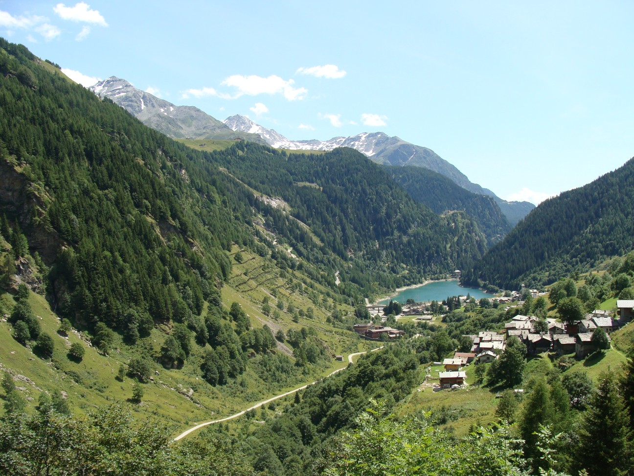 Valle San Giacomo col Lago di Isola